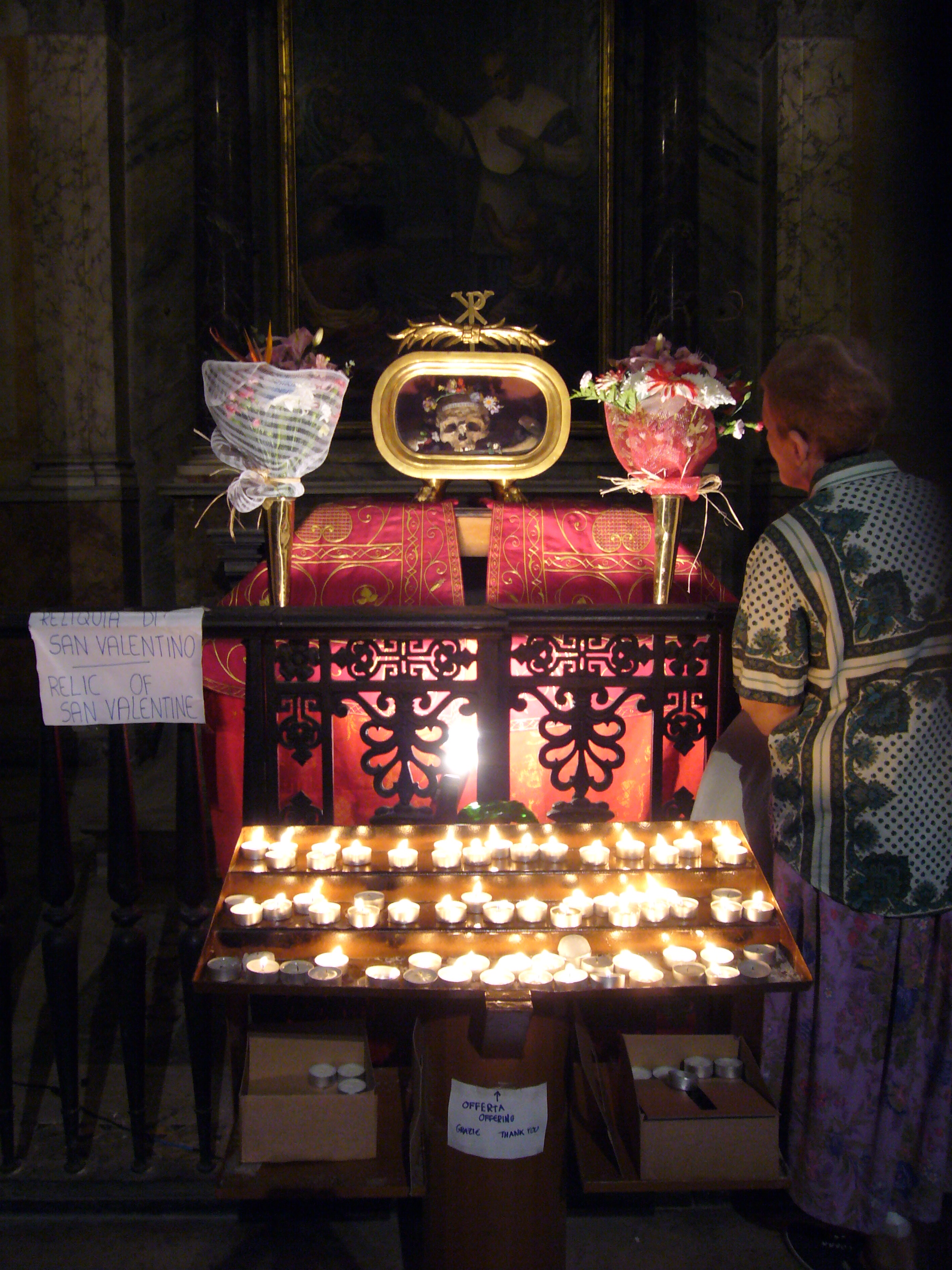 Roma, S. Maria in Cosmedin: reliquia di S. Valentino